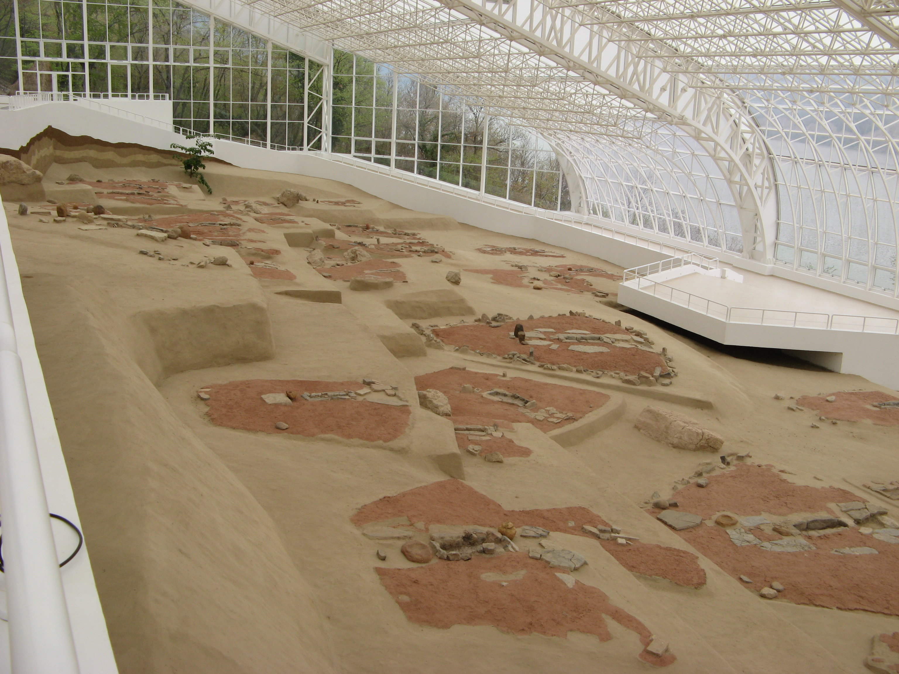 Muzej Lepenski Vir